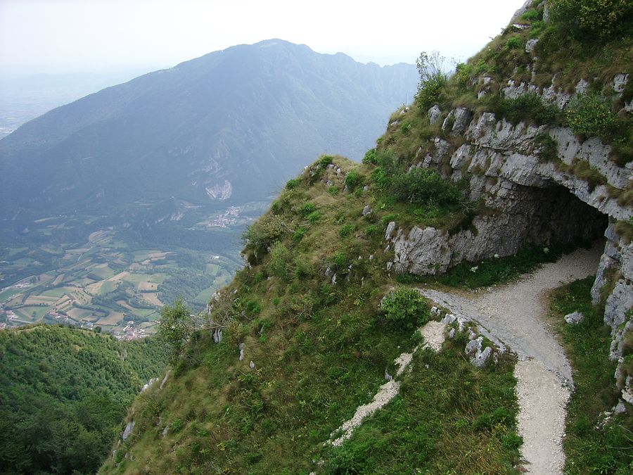 Mulattiera di arroccamento al Monte Cengio, Monte Cengio